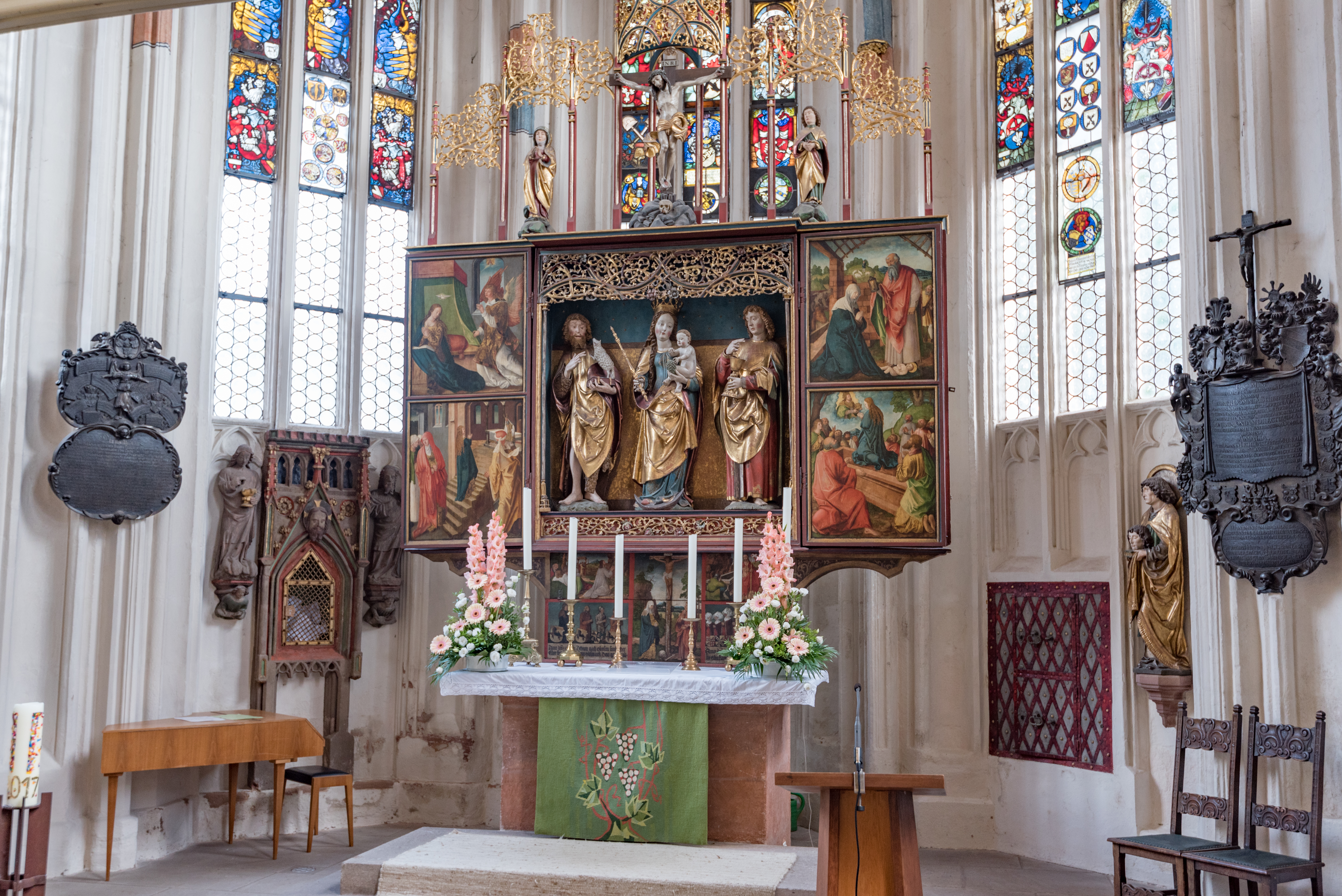 Nürnberg, Johannisstraße 57, Friedhofskirche St. Johannis